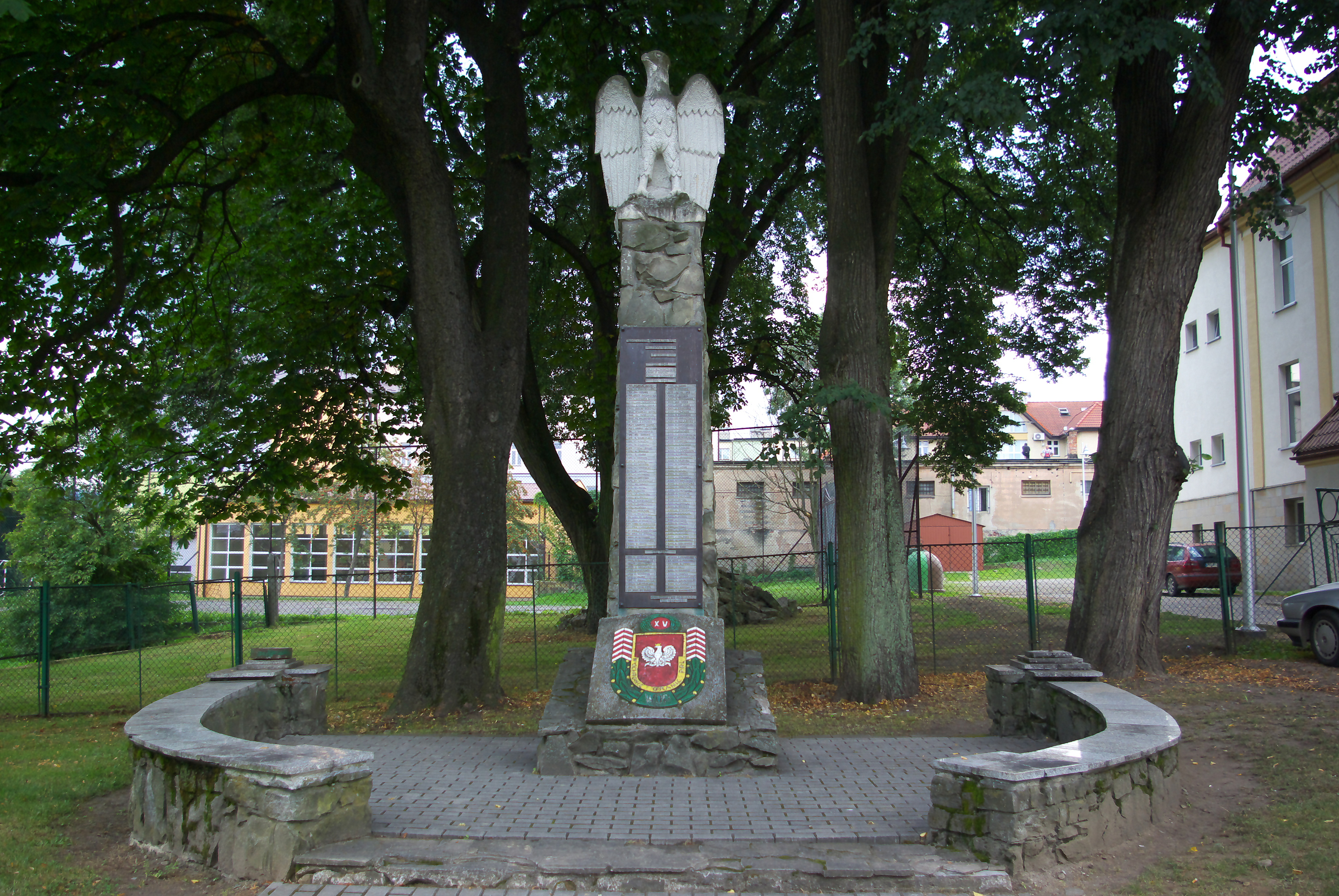 Pomnik bohaterskim żołnierzom WOP poległym w walce z bandami UPA w latach 1945-1947 w Sanoku